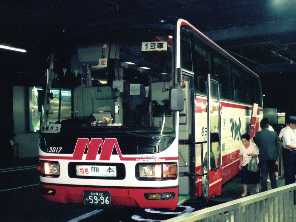 Meitetsu Bus 3017 "Shiranui" Mitsubishi P-MS729SA at Nagoya Meitetsu Bus Center